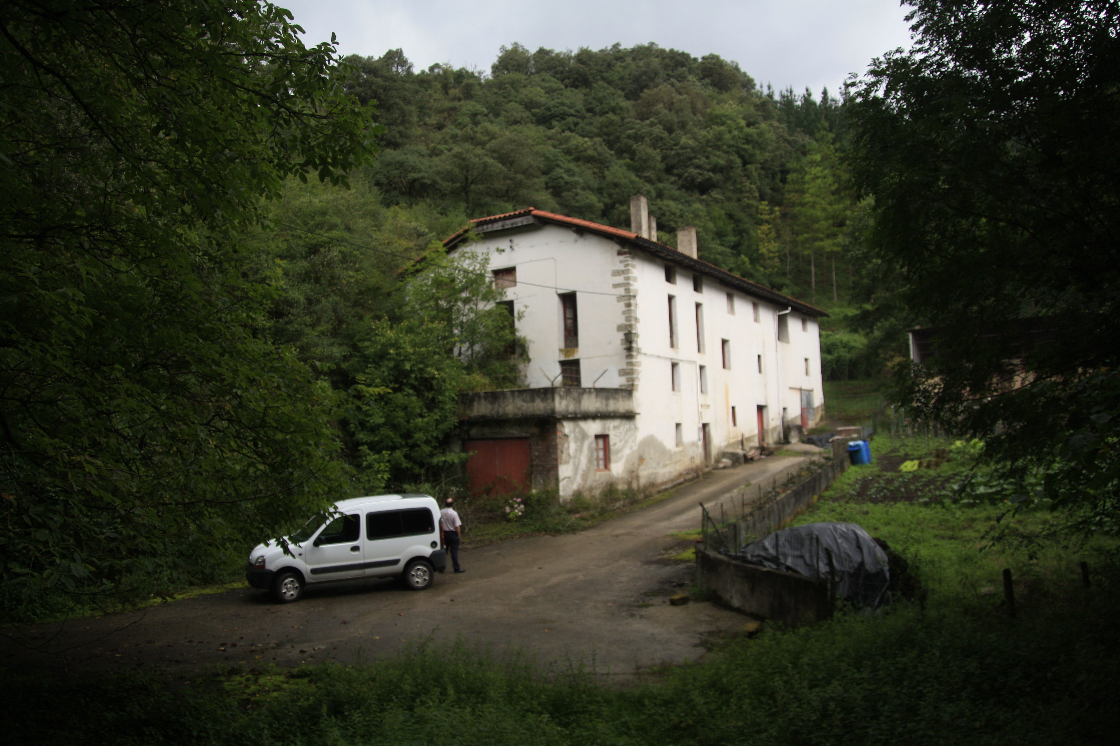 Ataungo San Gregorio auzoko Artaditxulo baserria. Bixente Esquisabel enpresaburu eta sustatzailearen jaiotetxea.